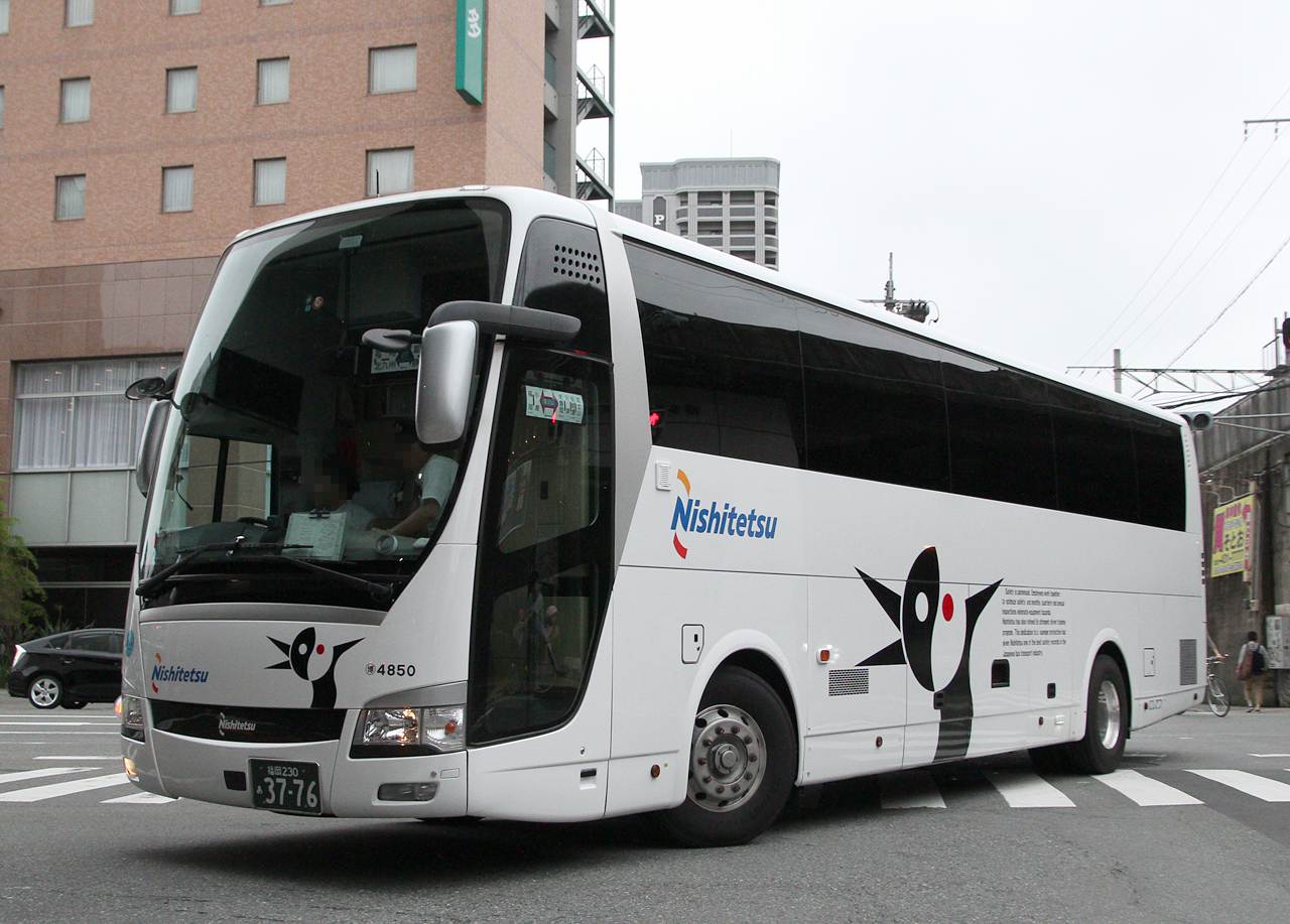 ・登録番号 福岡230あ37-76 ・西日本鉄道㈱博多自動車営業所所属 ・夜行高速路線用車両 ・2014年8月16日 福岡市博多区にて撮影 ・撮影者 Zondag2000